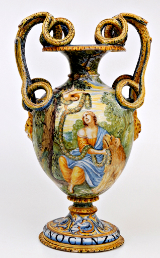 Anfora "Barberini" dipinta da Ippolito Rombaldoni con allegoria dell'innocenza e della discrezione. Urbania XVII secolo.